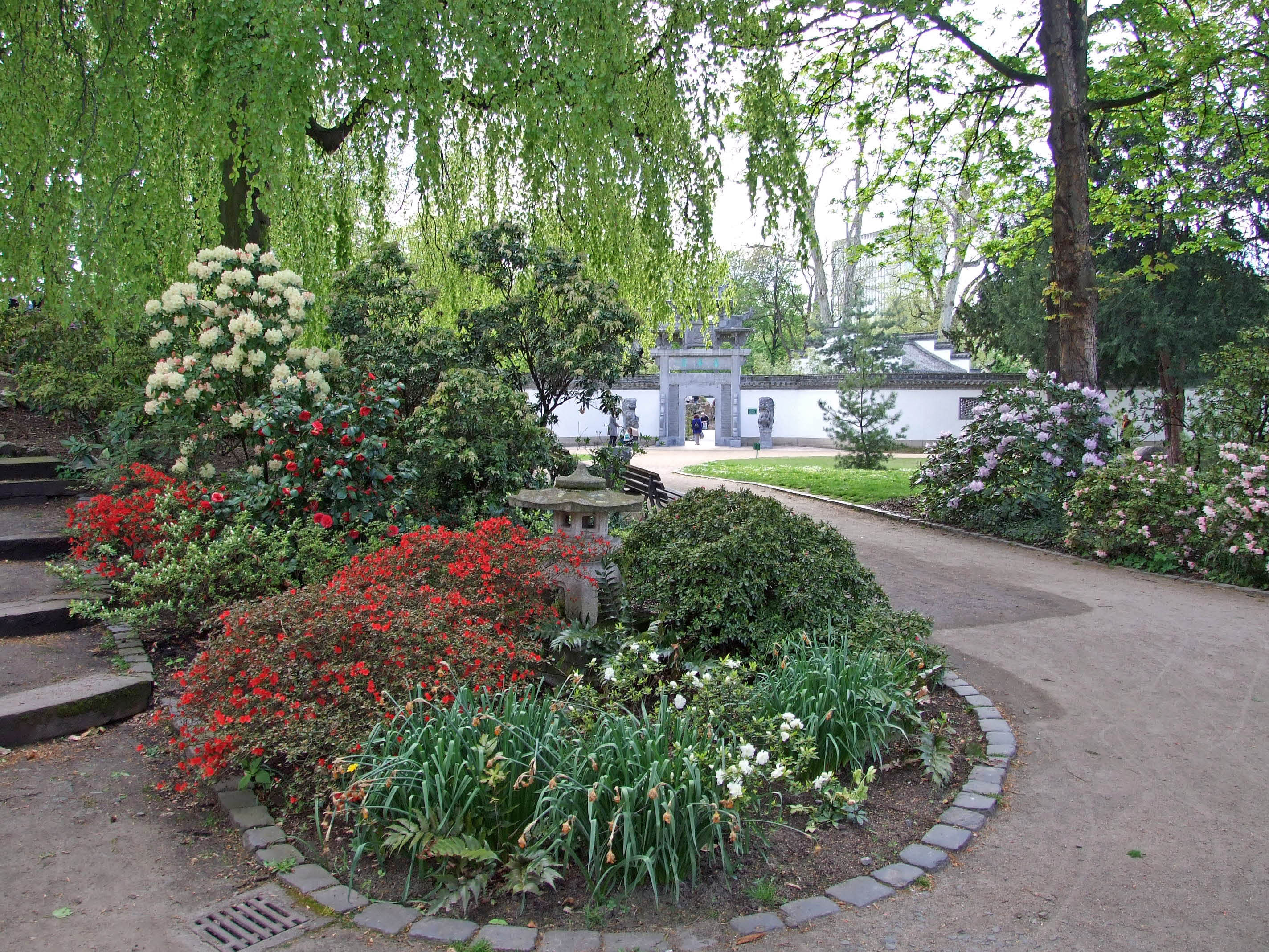 Grenzbereich des Bethmannparkes an der Berger Strasse mit Haupteingang zum chinesischen „Garten des Himmlischen Friedens“ in Ffm